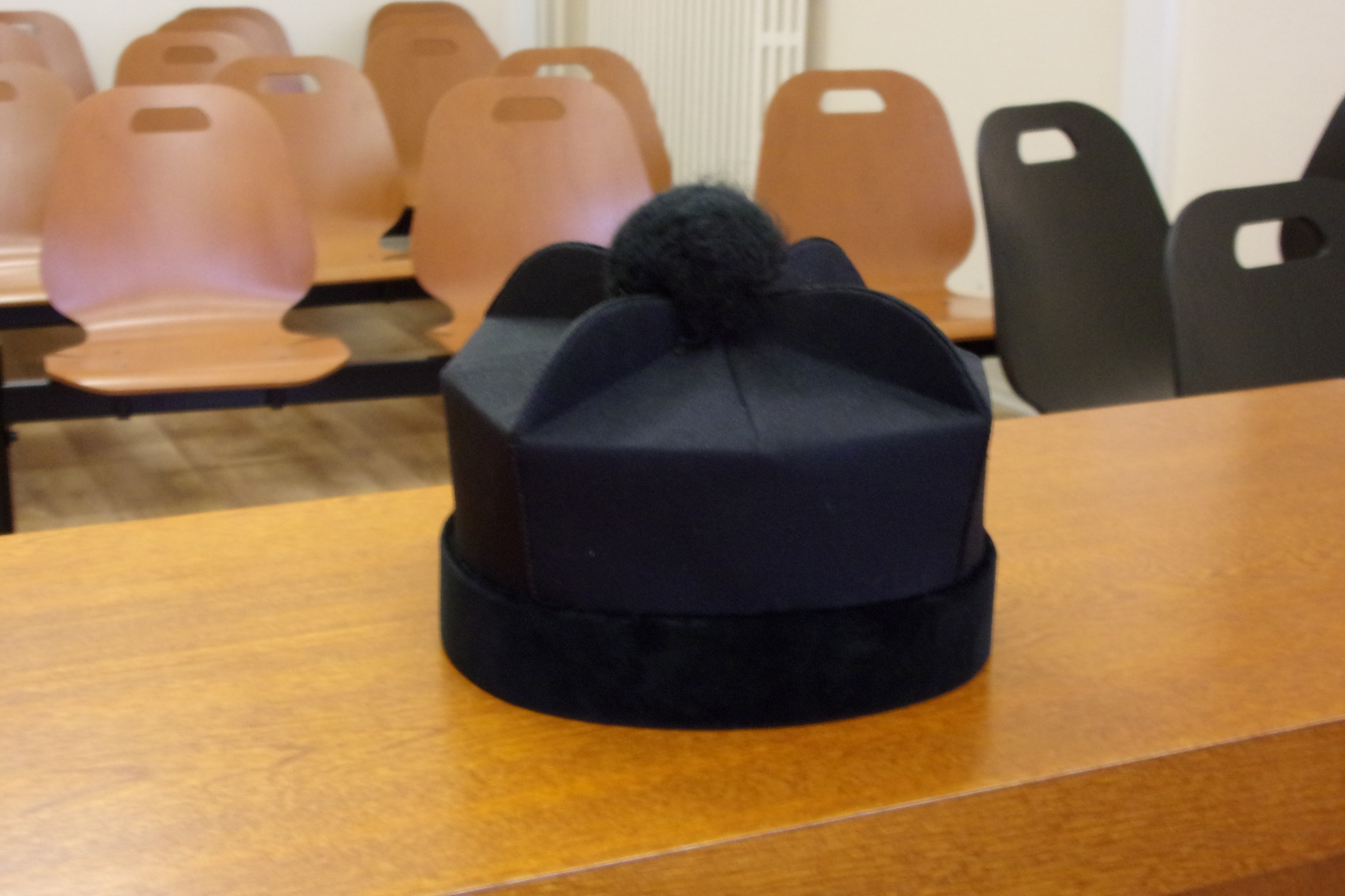 Toque d'avocat (photo prise au TGI de Paris).